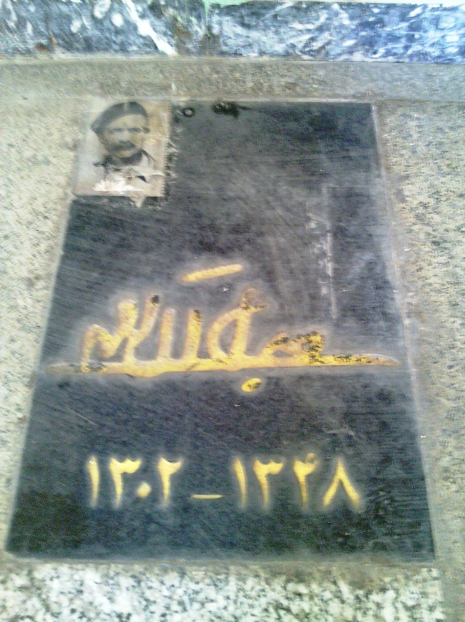 سنگ مزار جلال آل احمد در مسجد فيروز آبادي شهر ري